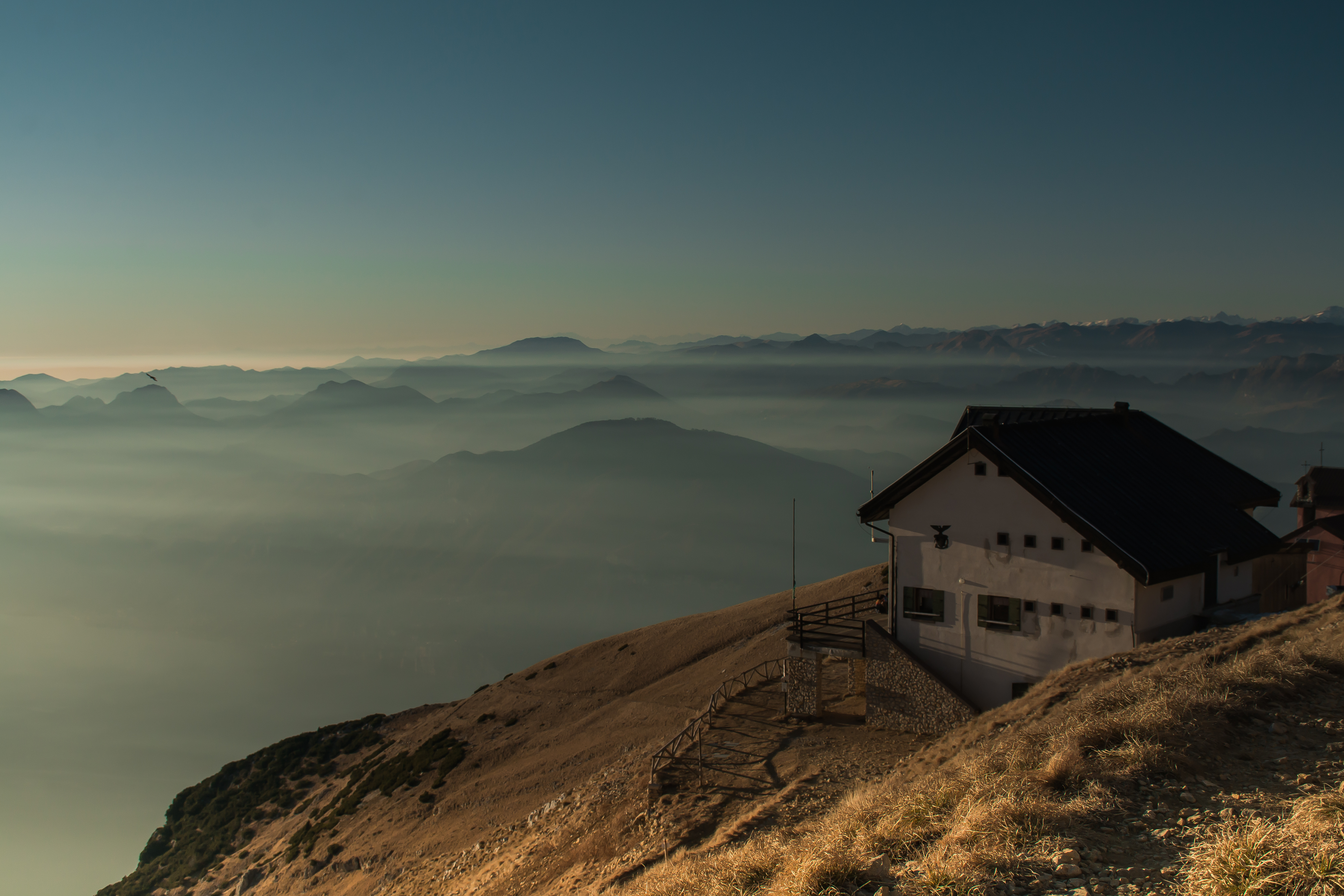 Parco naturale locale del Monte Baldo (Q49967625)